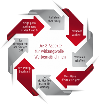 Infografik zu den 8 Aspekten der Werbewirkung